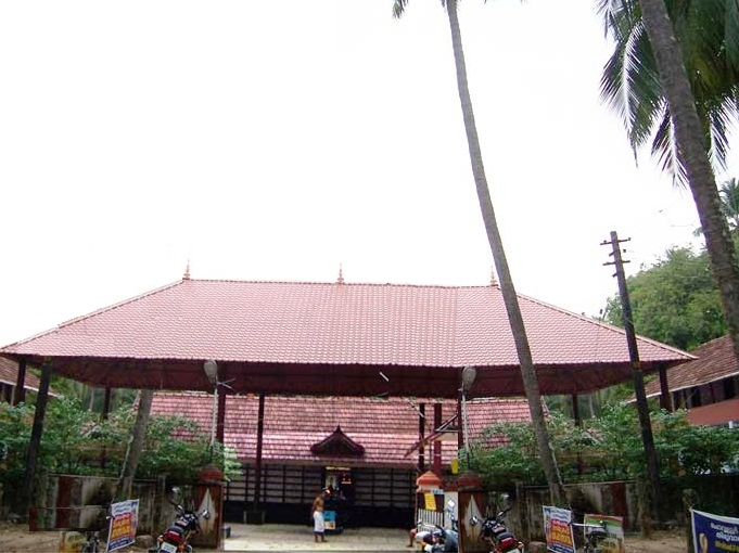 പെരുന്തട്ട മഹാദേവക്ഷേത്രം, പെരുന്തട്ട, ഗുരുവായൂർ